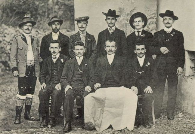 Odbor bralno pevskega društva Kras leta 1904 (Miljo Tamburjev, Pepo Špikotov, Tone Drejovkin, Karlo Pahor, France Ivanin, Jože Tinčin, Jušto Splacin, France Tičarjev, Tone Frajtrjov, Tone Bregov).